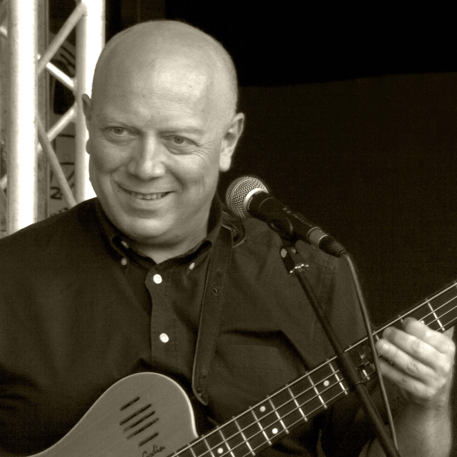 Portrait du contrebassiste et bassiste Jean-Marc Jafet lors du concert donné le 12 juillet 2004 dans le cadre du festival Off de Jazz à Juan